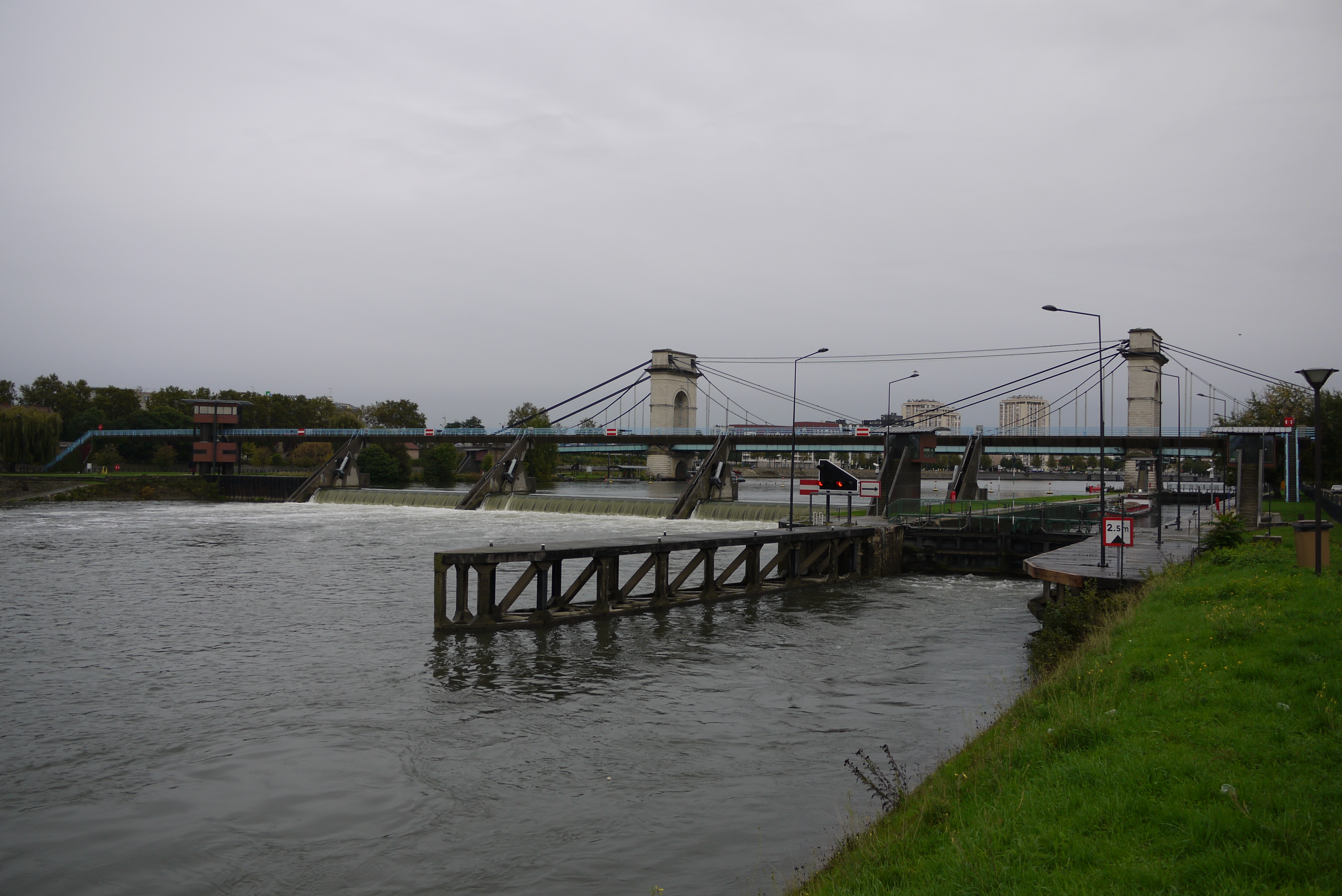 Le barrage éclusé du Port-à-l'Anglais vu depuis la rive gauche de la Seine, à Vitry-sur-Seine.